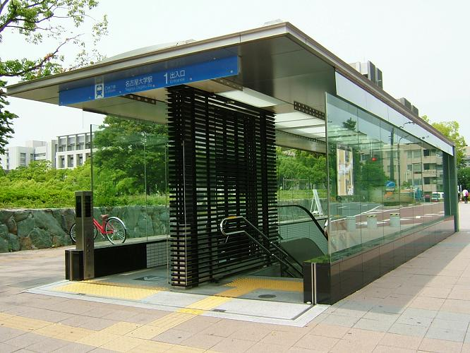 名古屋市営地下鉄名城線名古屋大学駅の1番出入口